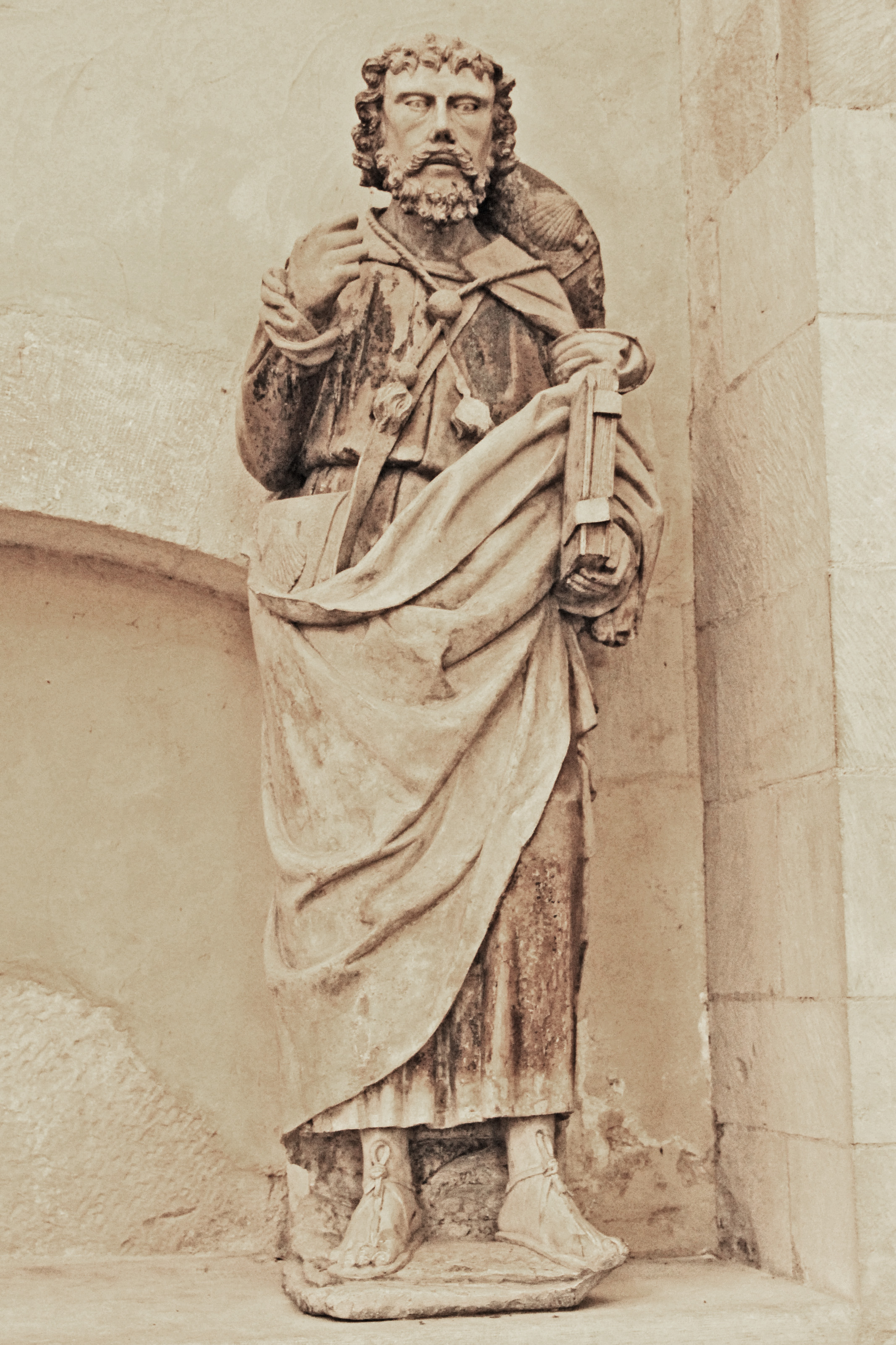 Kathedrale Nevers, Skulptur